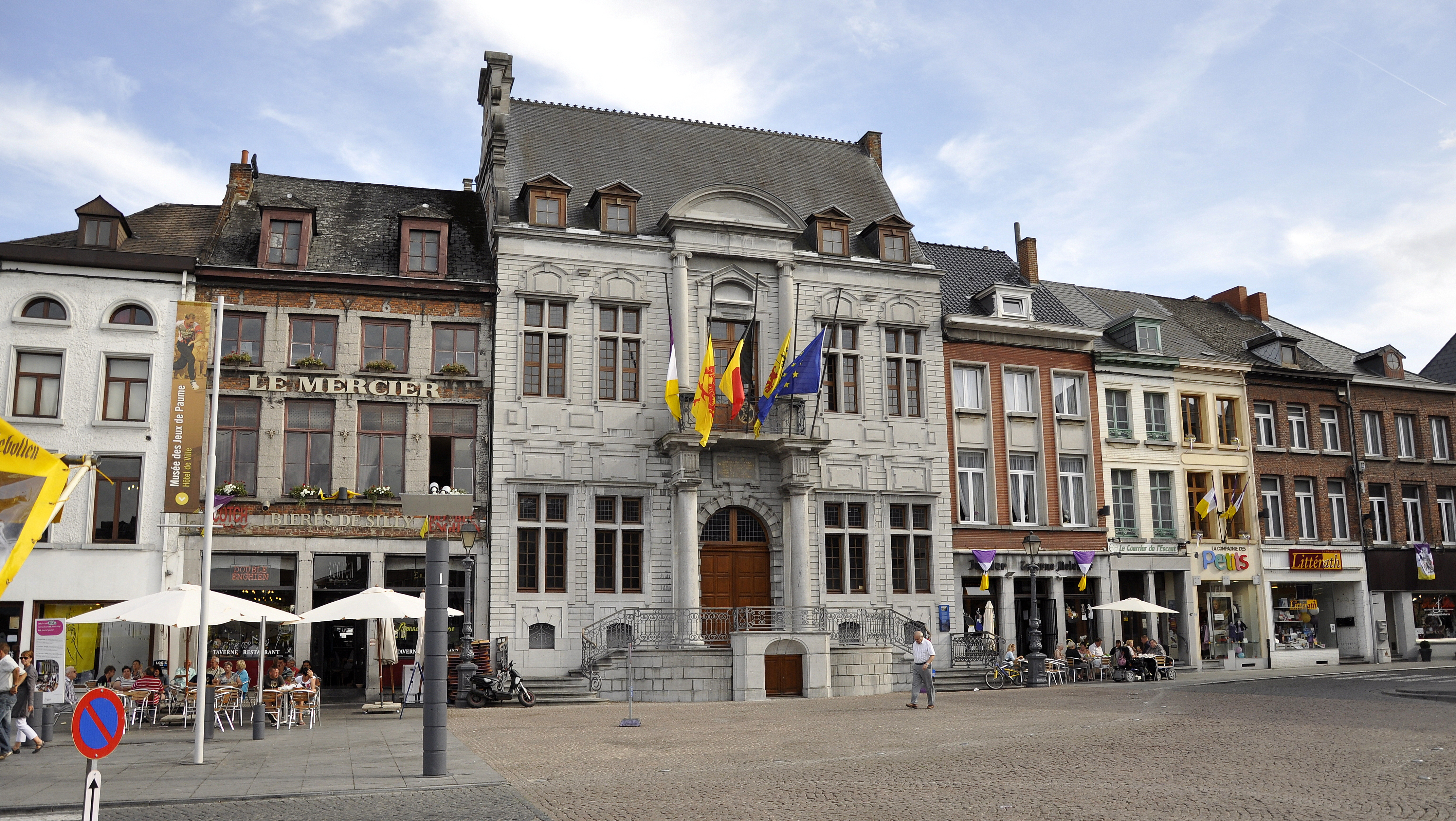 Het stadhuis van Aat, België